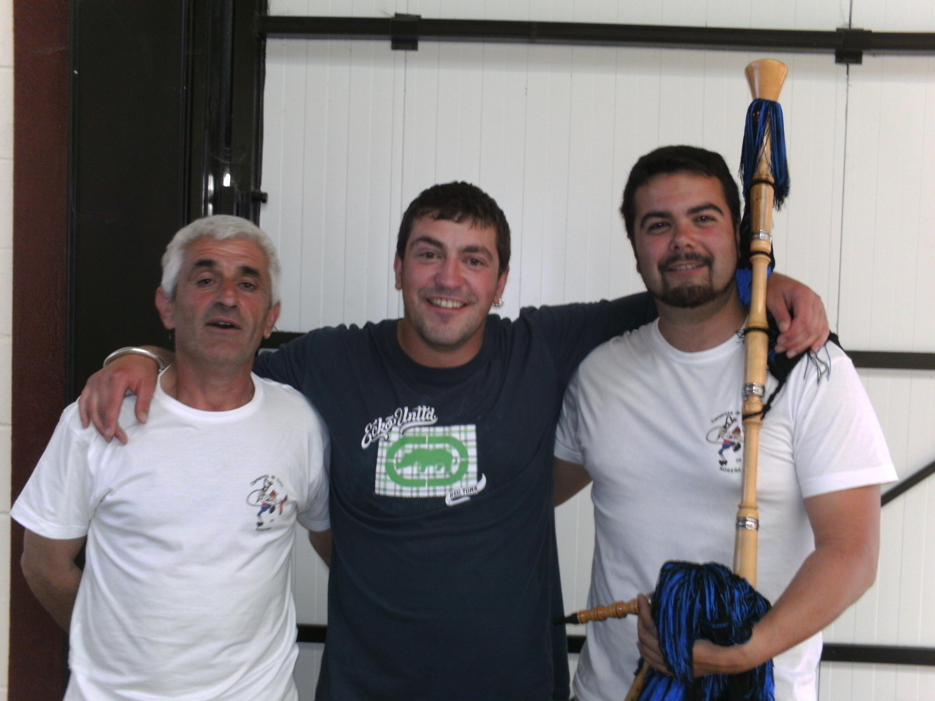 Equipu de la Camaretá de Liriu de Noreña qu'algamó'l triunfu na tercera xornada del II Campionatu d'Asturies. La Villa, 22-V-2010.